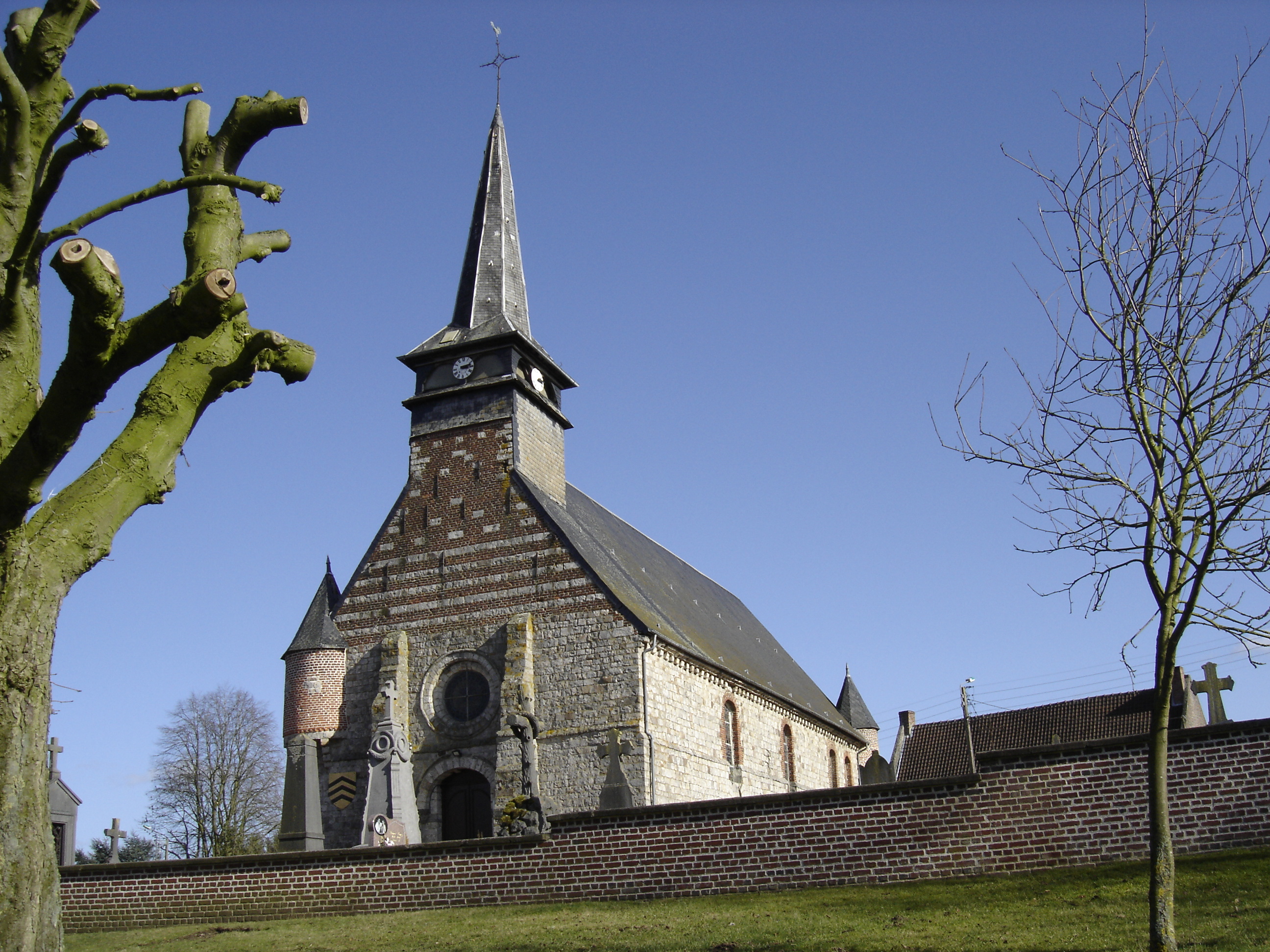 Eglise Sainte-Elisabeth de Neuville-en-Avesnois